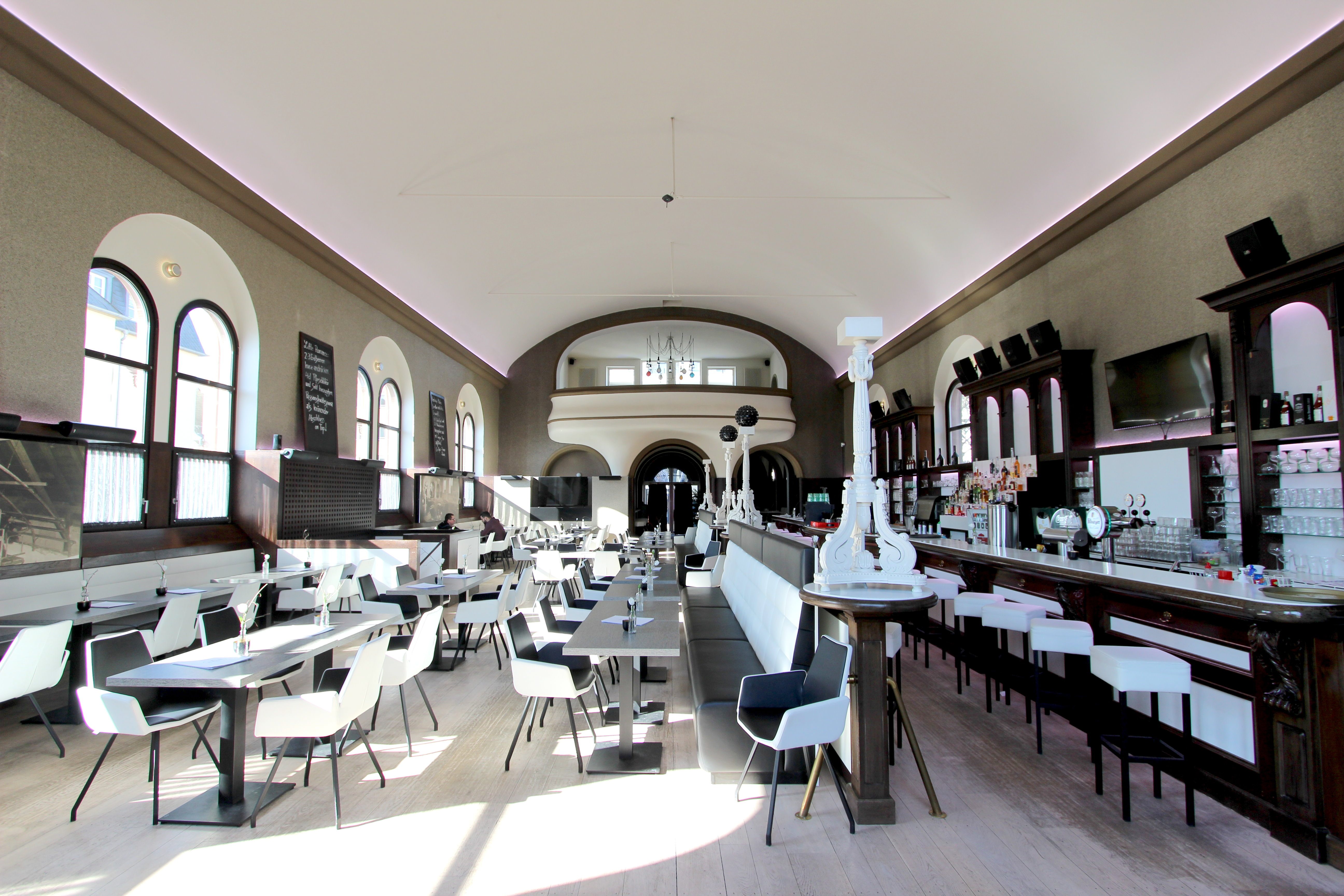 54634 Bitburg, Trierer Straße 11. Turnhalle; aufwändiger späthistoristischer Bau, Verkleidung aus Kalksteinquadern und Rotsandstein, bezeichnet 1906 Die aufwendige ehemalige Turnhalle wurde 1906 als Nebengebäude der damaligen Landwirtschaftsschule errichtet. Eine Umnutzung des Gebäudes zur Gastronomie fand 1999 statt; Architekt Johannes Götz, Köln. Aufnahme von 2018.